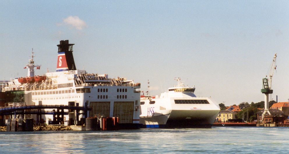 Schnellfähre HSS 900 mit Gasturbinenantrieb Information about Stena Danica may be found at IMO 7907245. A ship can change her name and flag state through time, but the IMO number remains the same through the hull's entire lifetime. Therefore, it's useful to identify a ship through her IMO number. Information about Stena Carisma may be found at IMO 9127760. A ship can change her name and flag state through time, but the IMO number remains the same through the hull's entire lifetime. Therefore, it's useful to identify a ship through her IMO number.